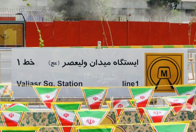 ایستگاه میدان ولیعصر شیراز،درب ورودی